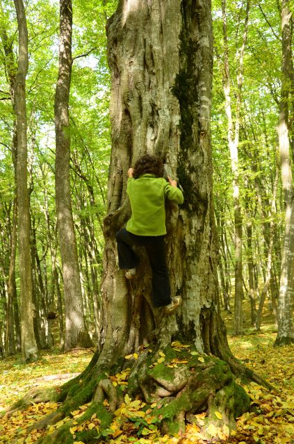 Najstarší hrab na Dolnom vrchu. Jeho vek sa odhaduje na cca 150 rokov.